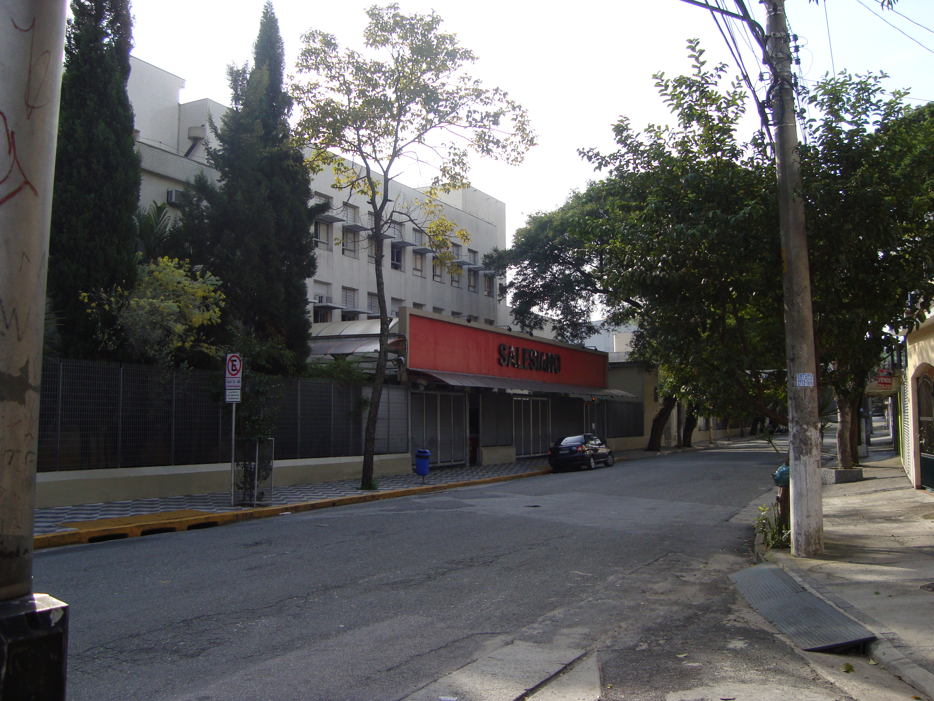 Foto do Colégio Salesiano Santa Terezinha